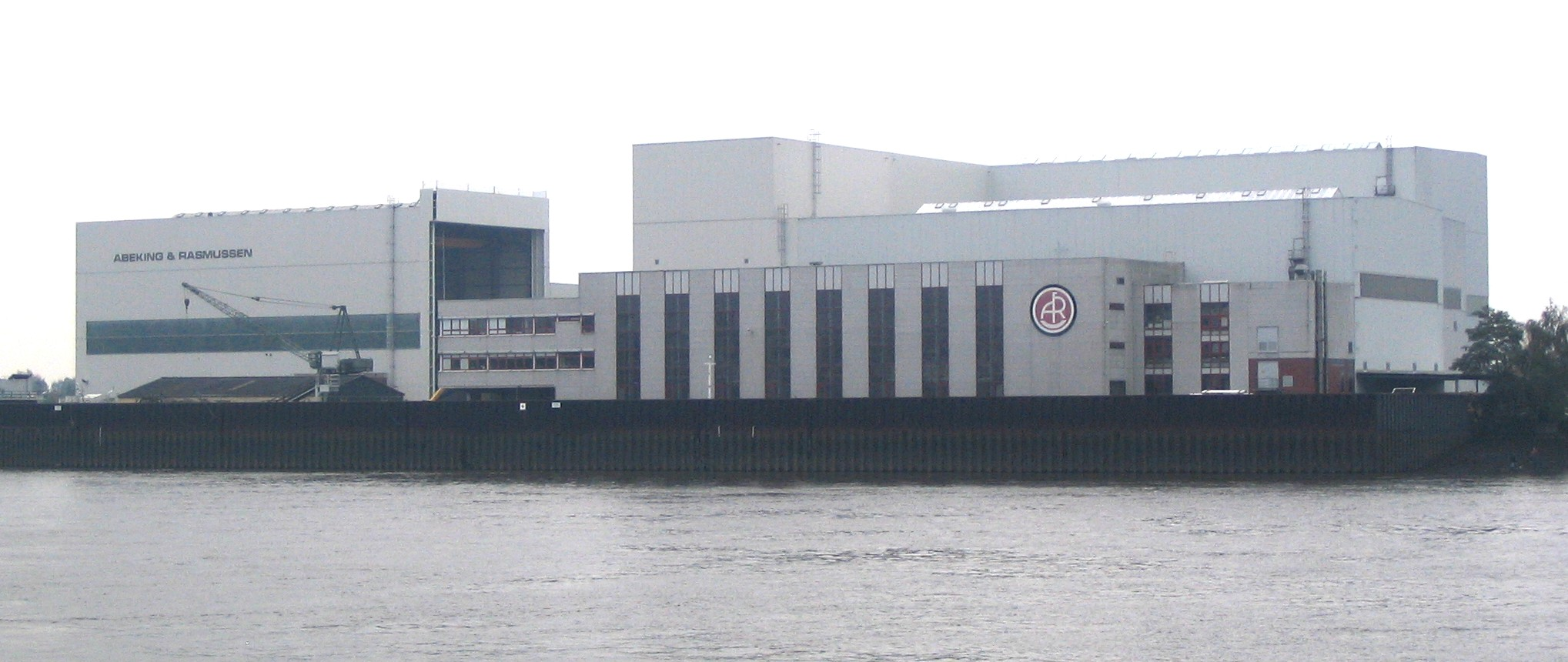 Der Werftbetrieb "Abeking und Rasmussen" in Lemwerder bei Bremen.